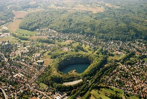 Nördliche Schiefergneiszone des Frankenstein-Komplexes. Nieder-Ramstadt mit Wingertsberg (Amphibolit/Diorit). Kirchberg-Lindenberg-Rücken (Trautheim)